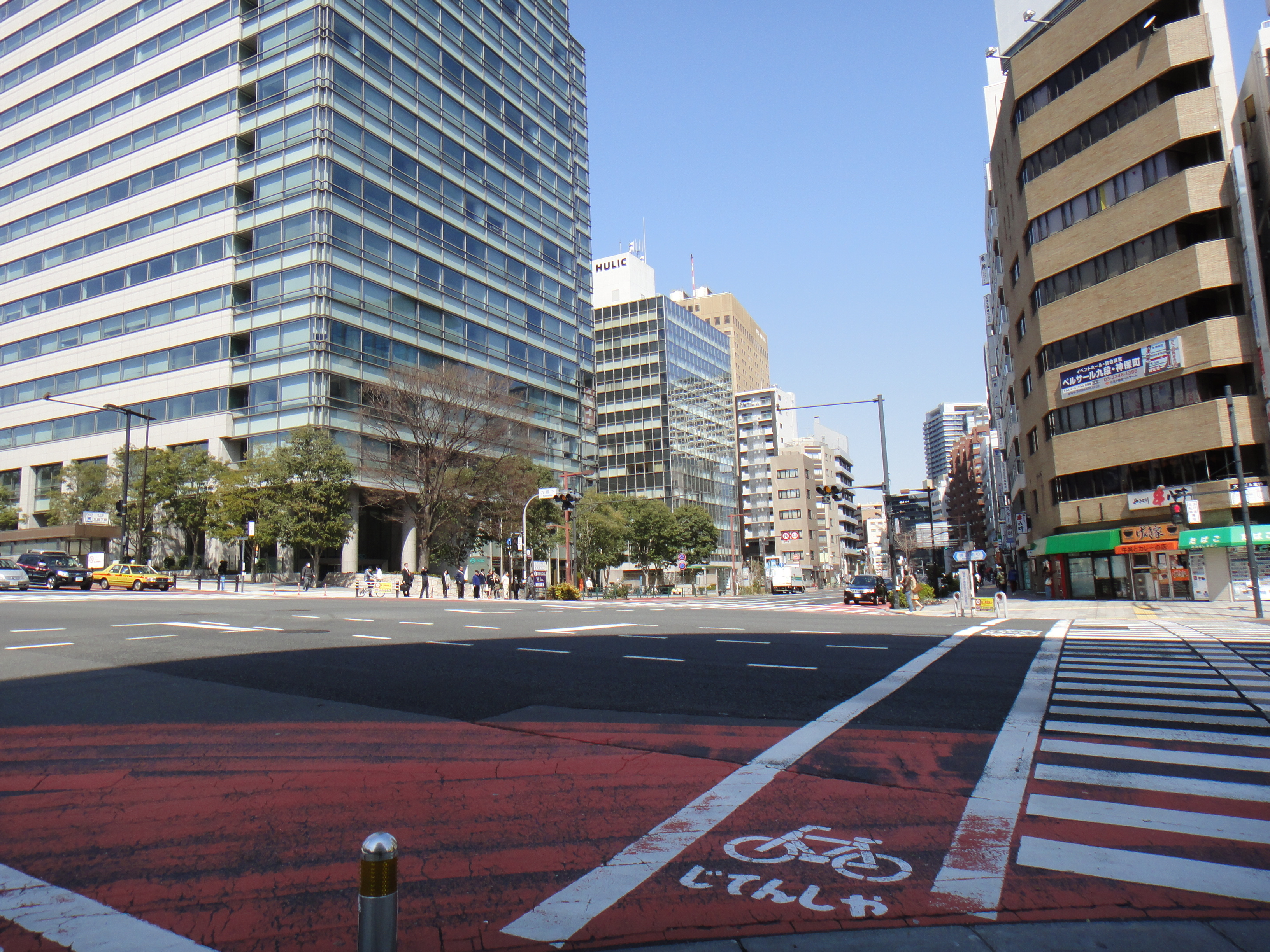 Kudanminami, 九段下